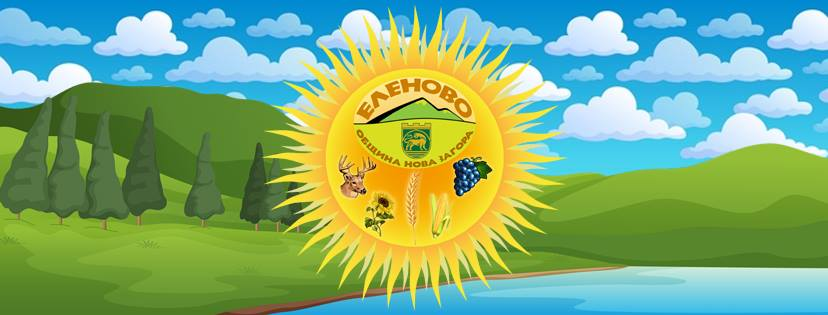 емблема Еленово